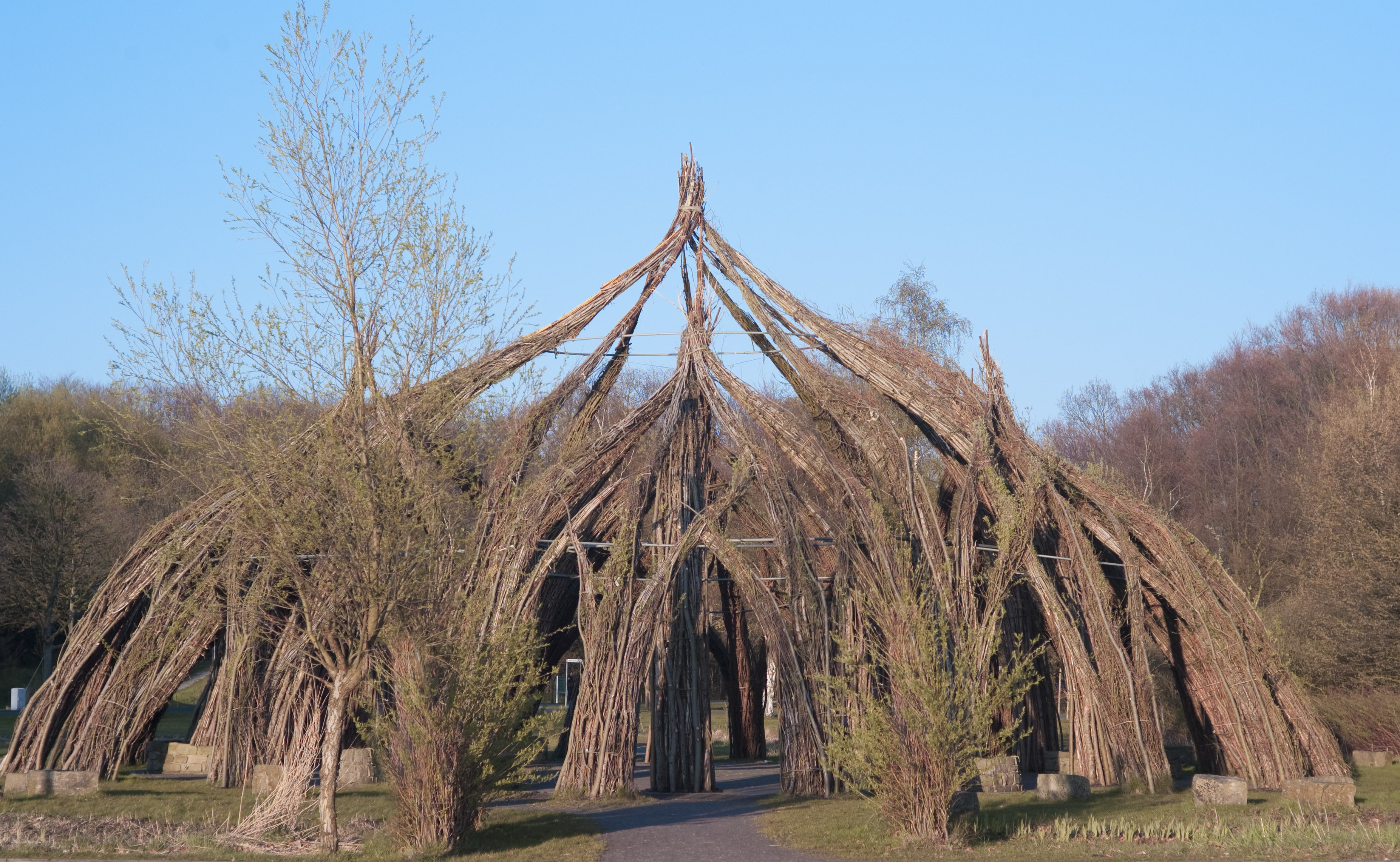 Weidenschloß - Speckenbütteler Park im Frühling, Bremerhaven